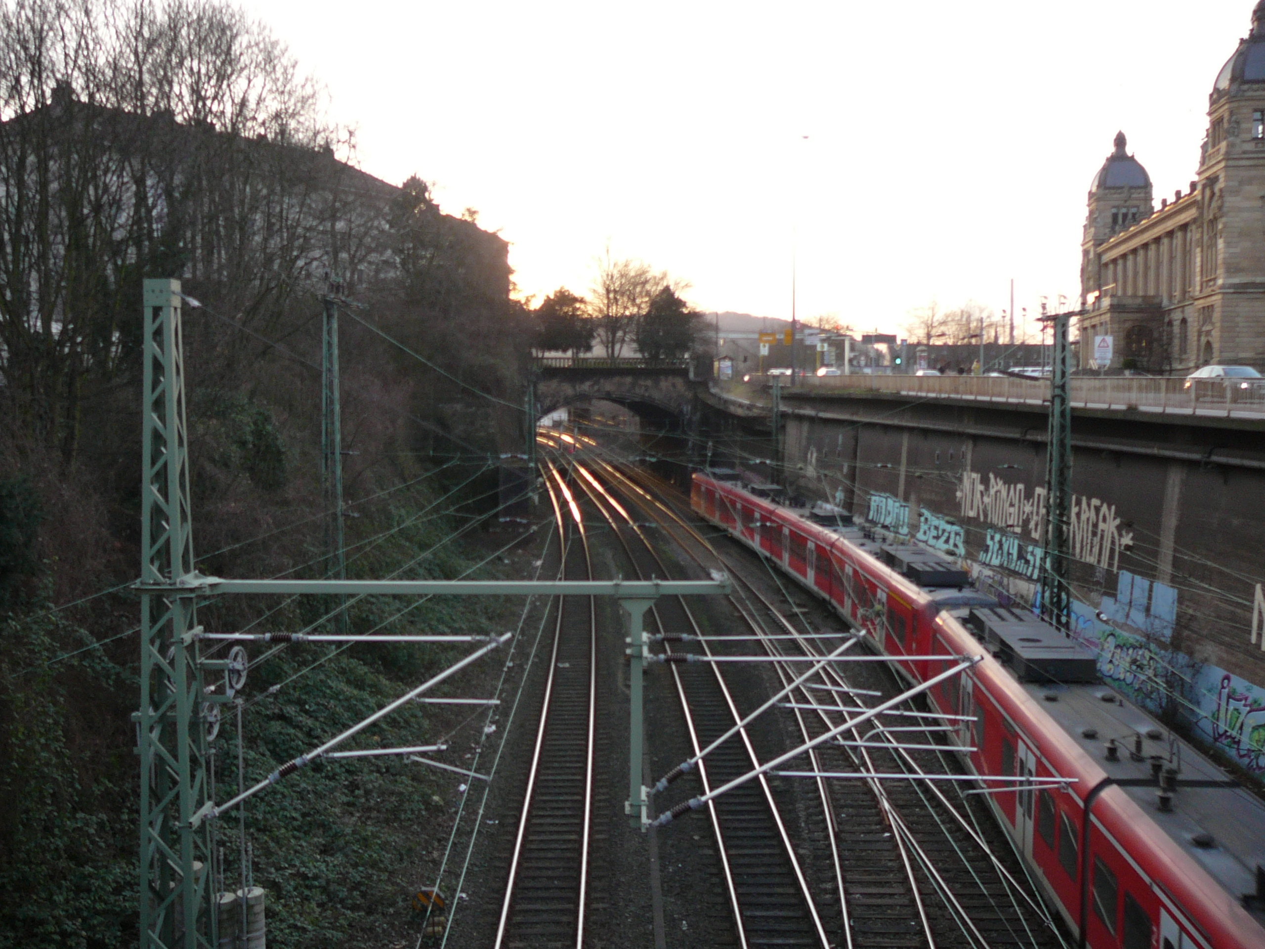 Südstadt, Wuppertal